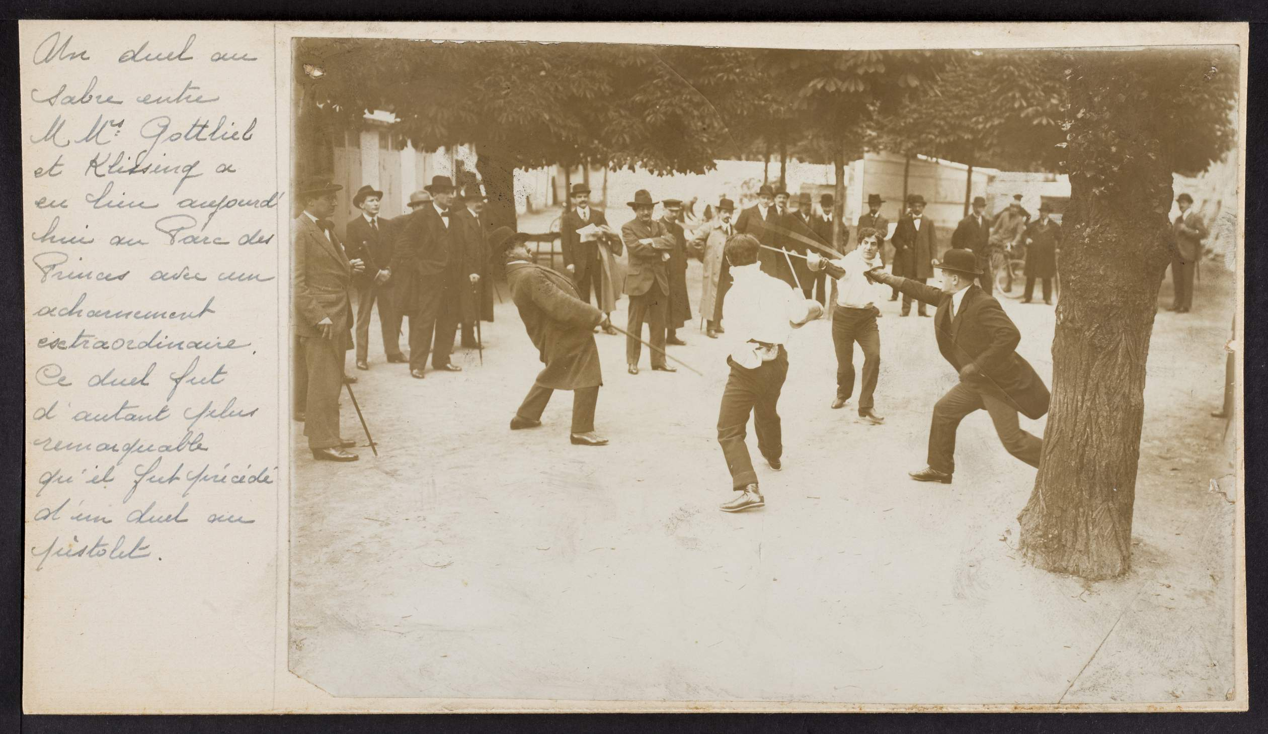 Un duel au sabre entre M Gottliel et Klissing a eu lieu aujourd'hui au Parc des Princes avec un acharnement extraordinaire. Ce duel fut d'autant plus remarquable qu'il fut précédé d'un duel au pistolet.